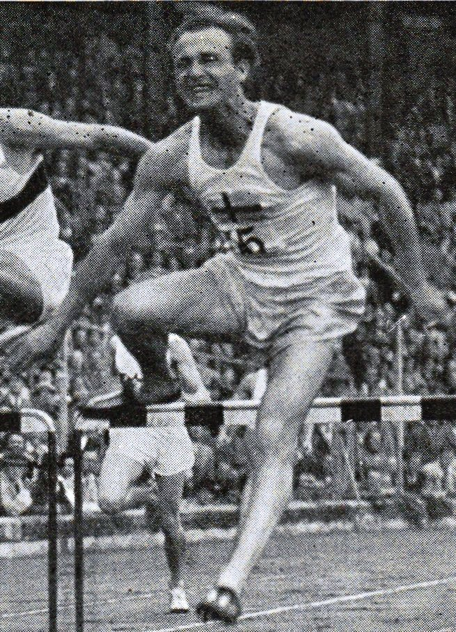 Kell Areskoug (1906-1996), Swedish hurdler